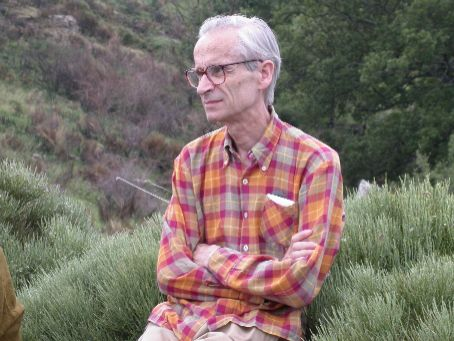 Portrait de Gérard Toulouse